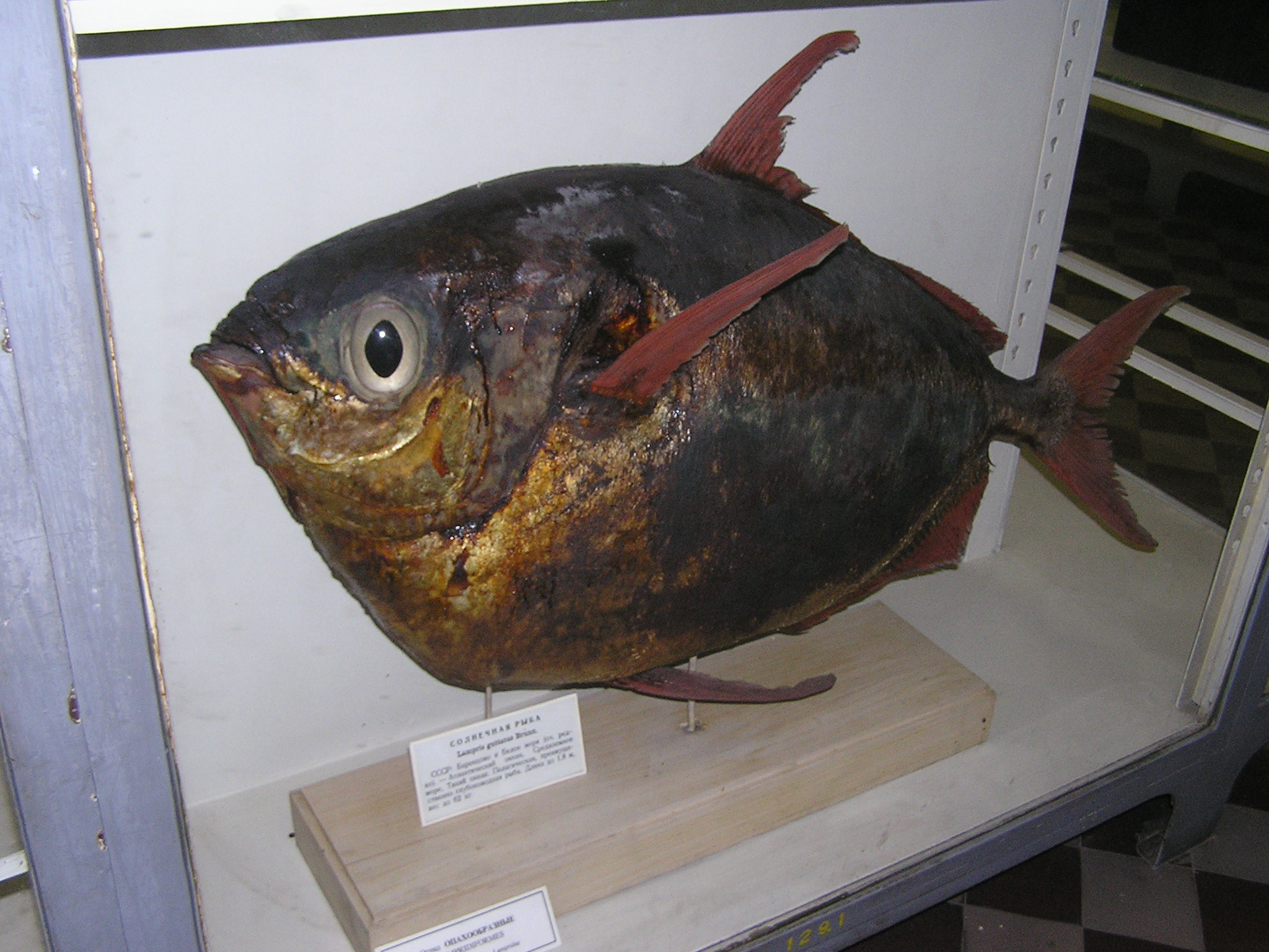 Зоологический музей в Санкт-Петербурге. Солнечная рыба